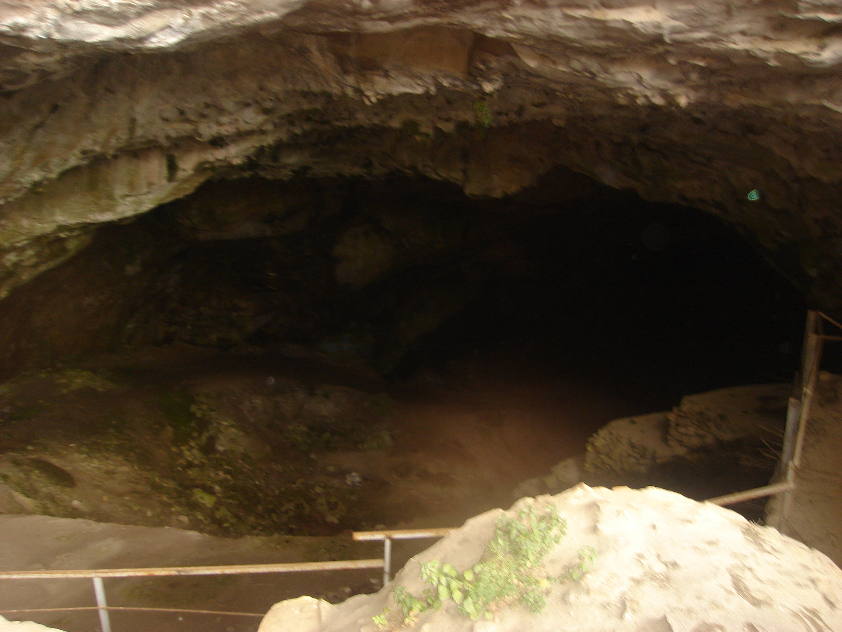 Σπήλαιο Νταβέλη«Σπήλαιο Νταβέλη»